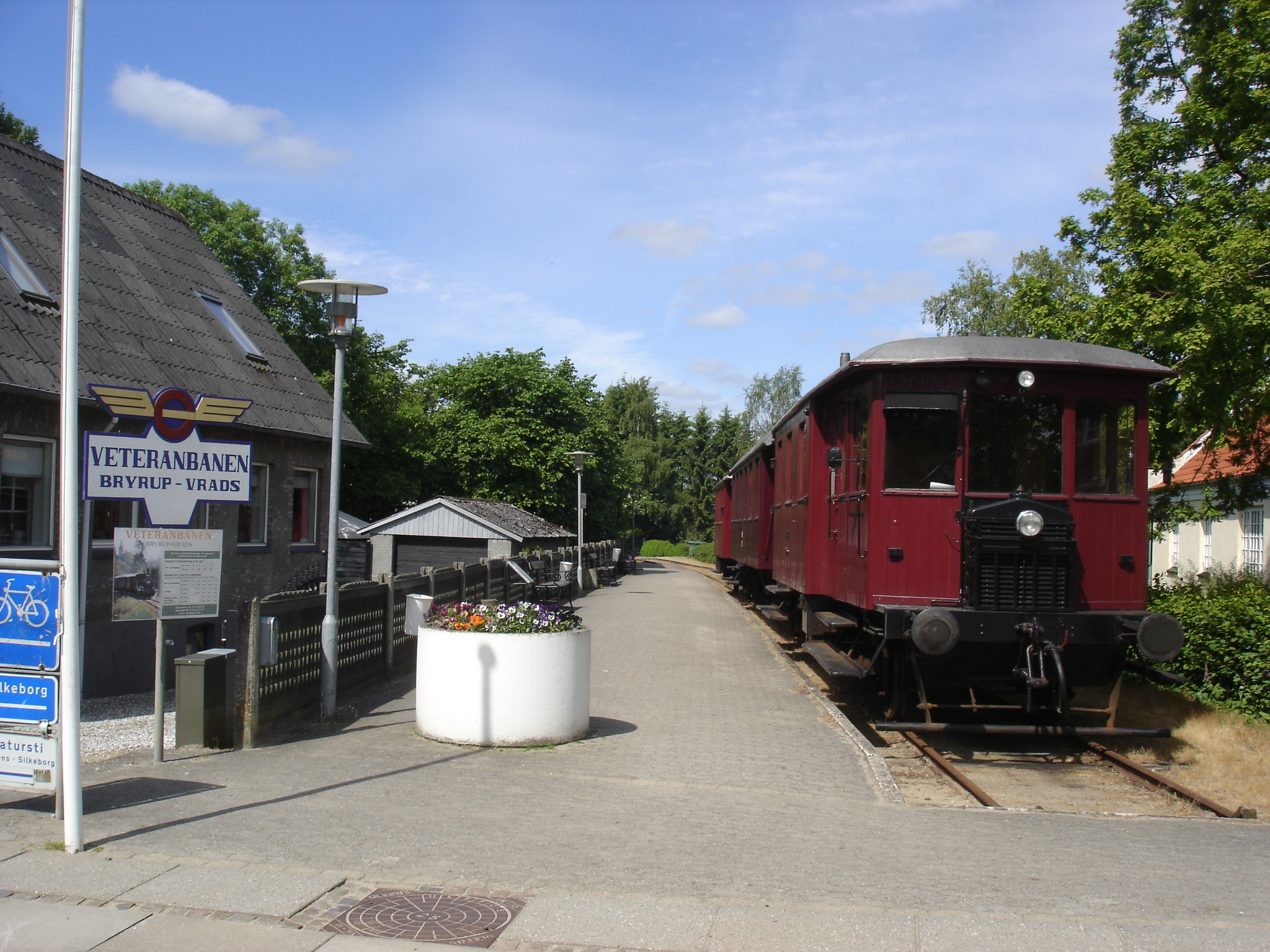 Veteranbanen starter ved Hovedgaden